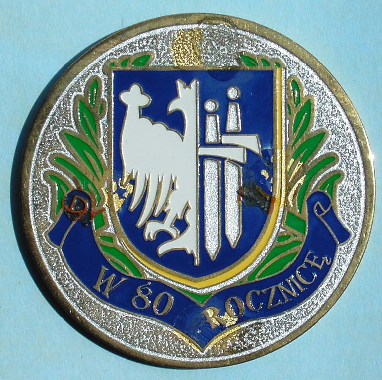 Medal pamiatkowy 15 Warmińsko Mazurskiej Dywizji Zmechanizowanej (rewers)